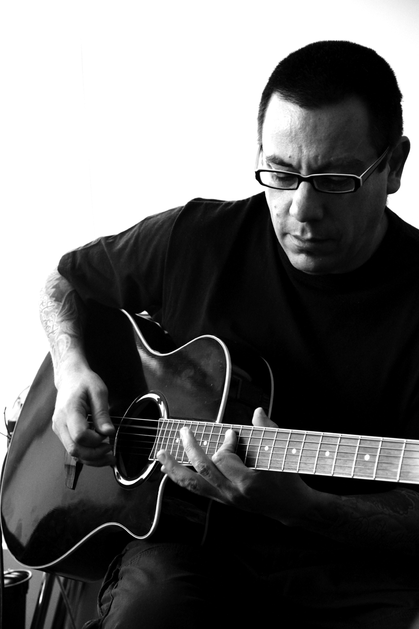 ensayando